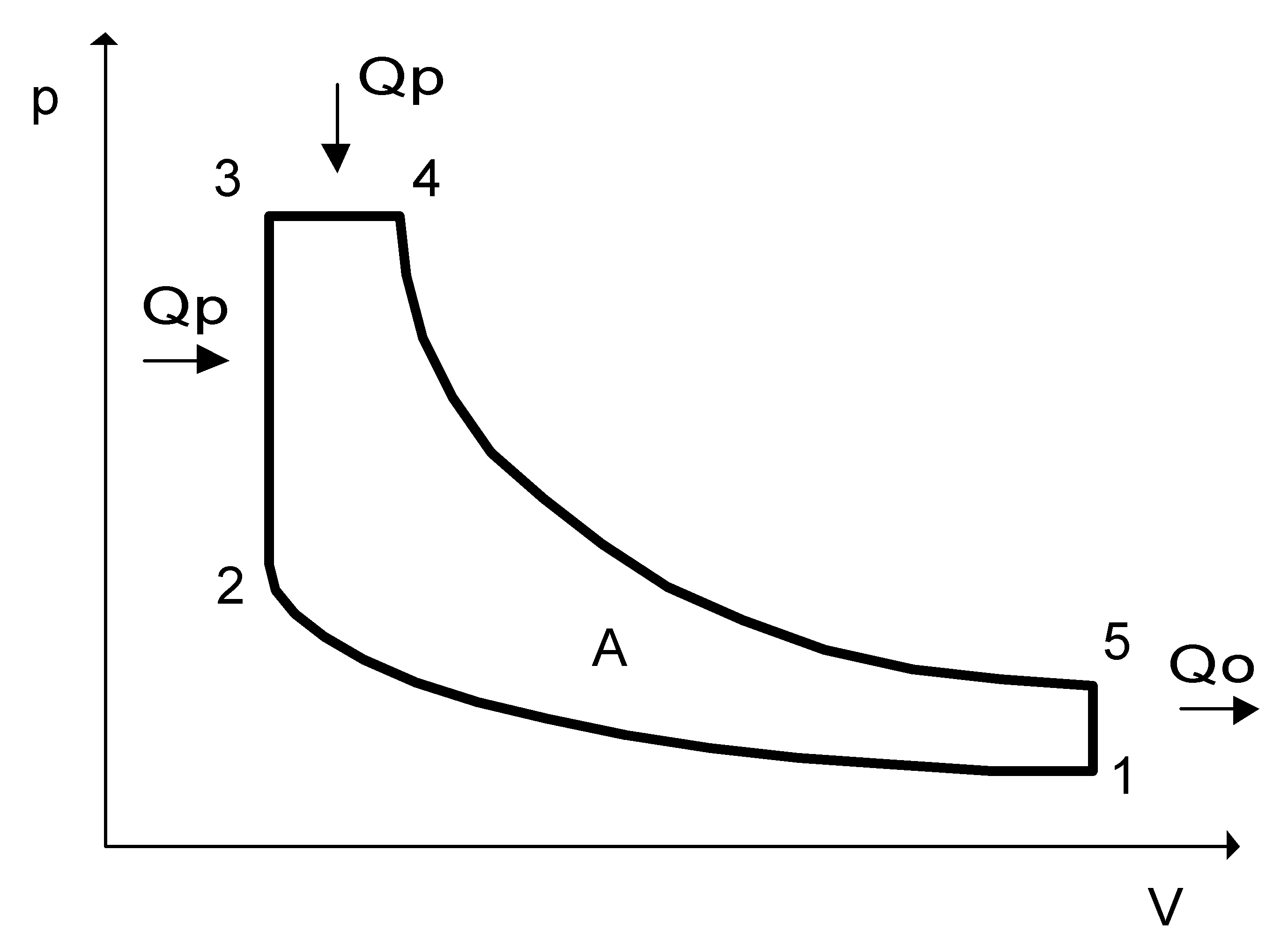 Seiliger cycle in p-V diagram.